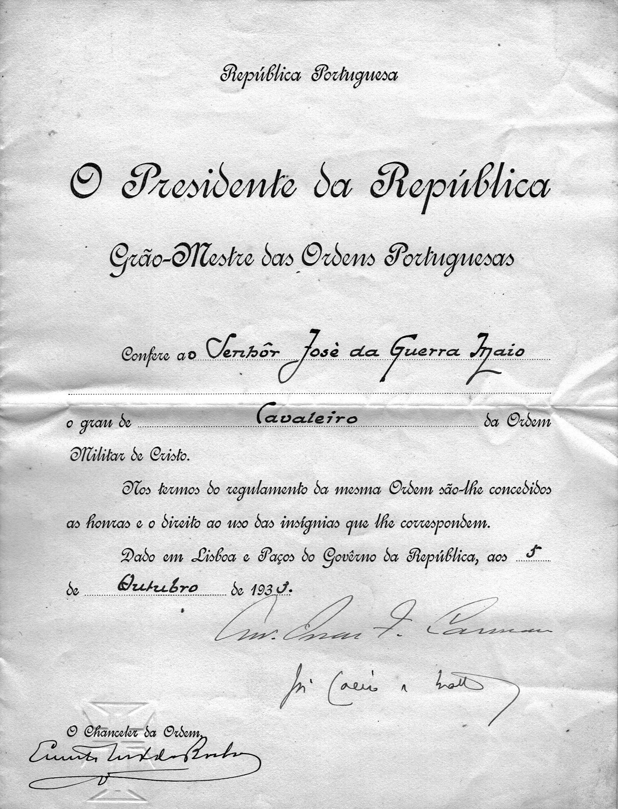 Grau de Cavaleiro conferido pelo Presidente da República